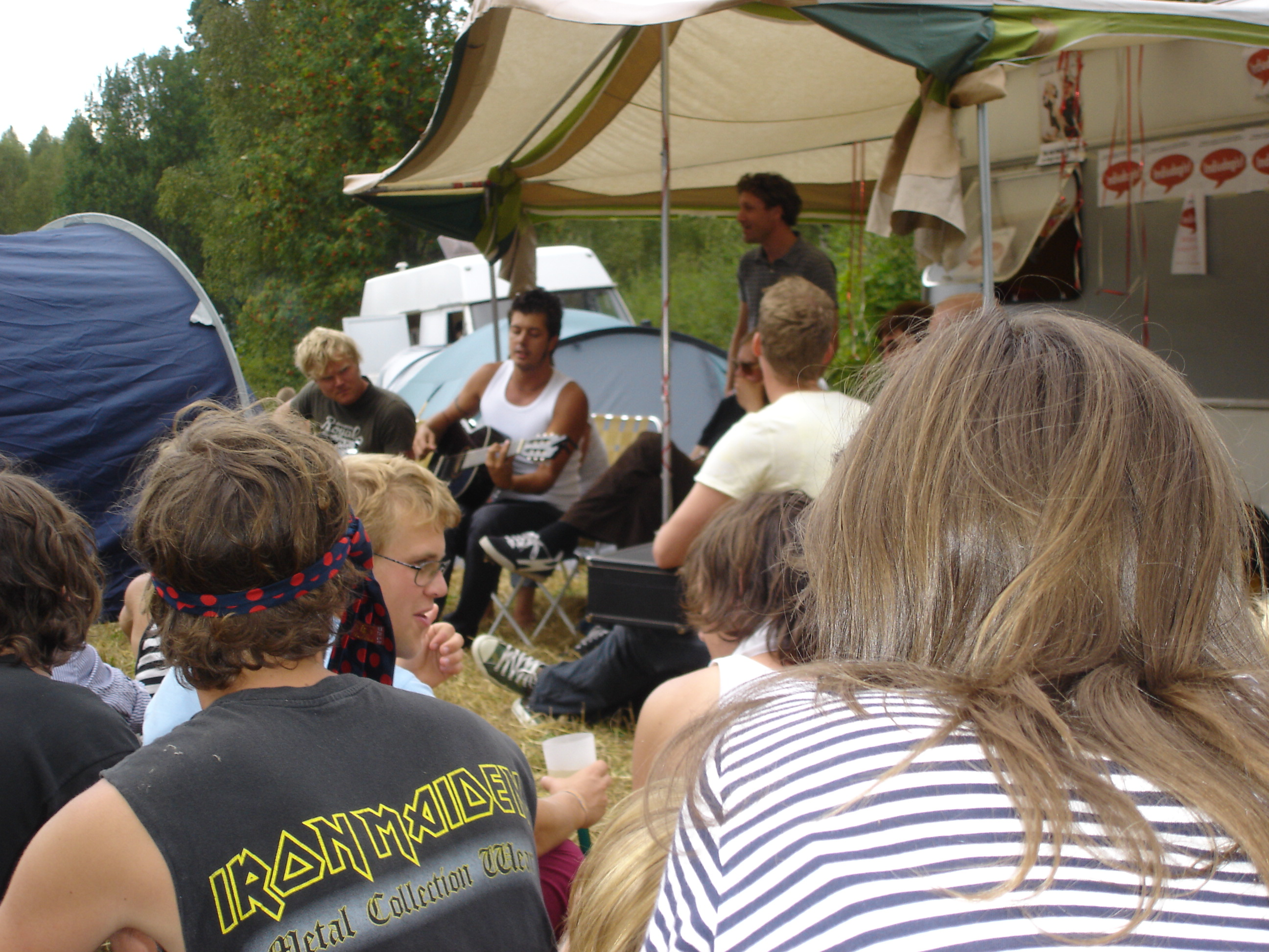 minikonsert på emmabodafestivalens husvagnscamping 2006